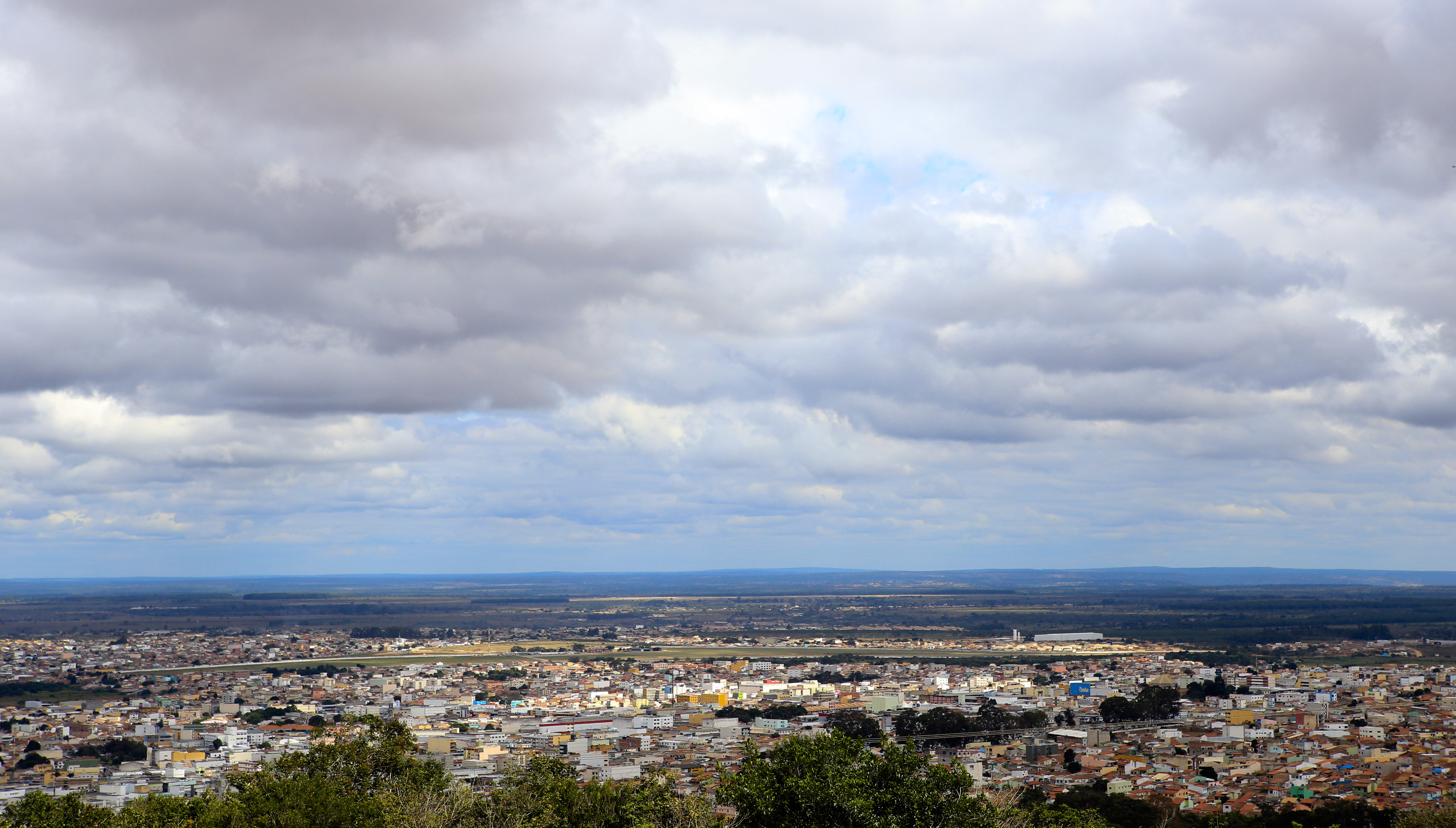 Vitória da Conquista